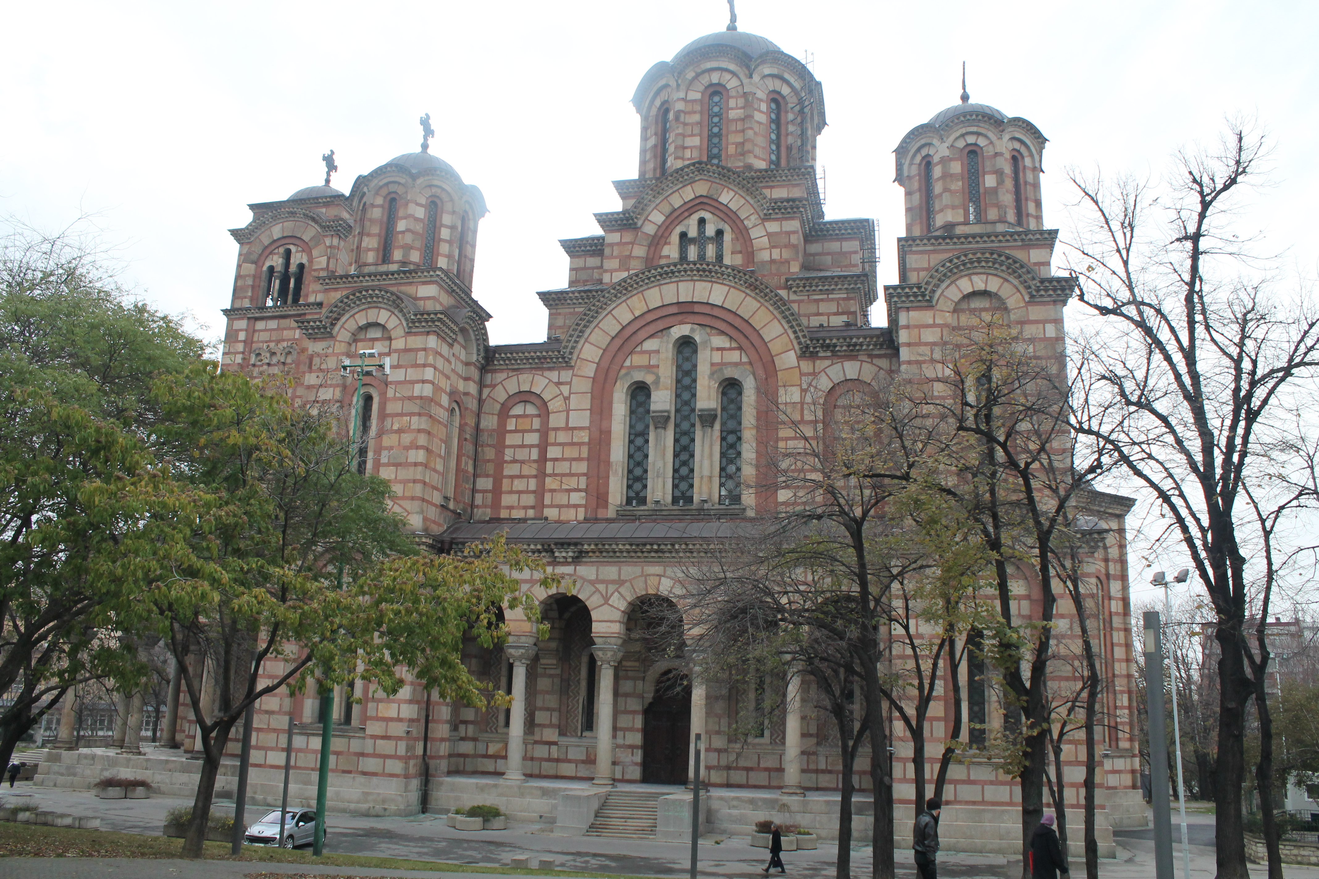 Belgrade. November 2014